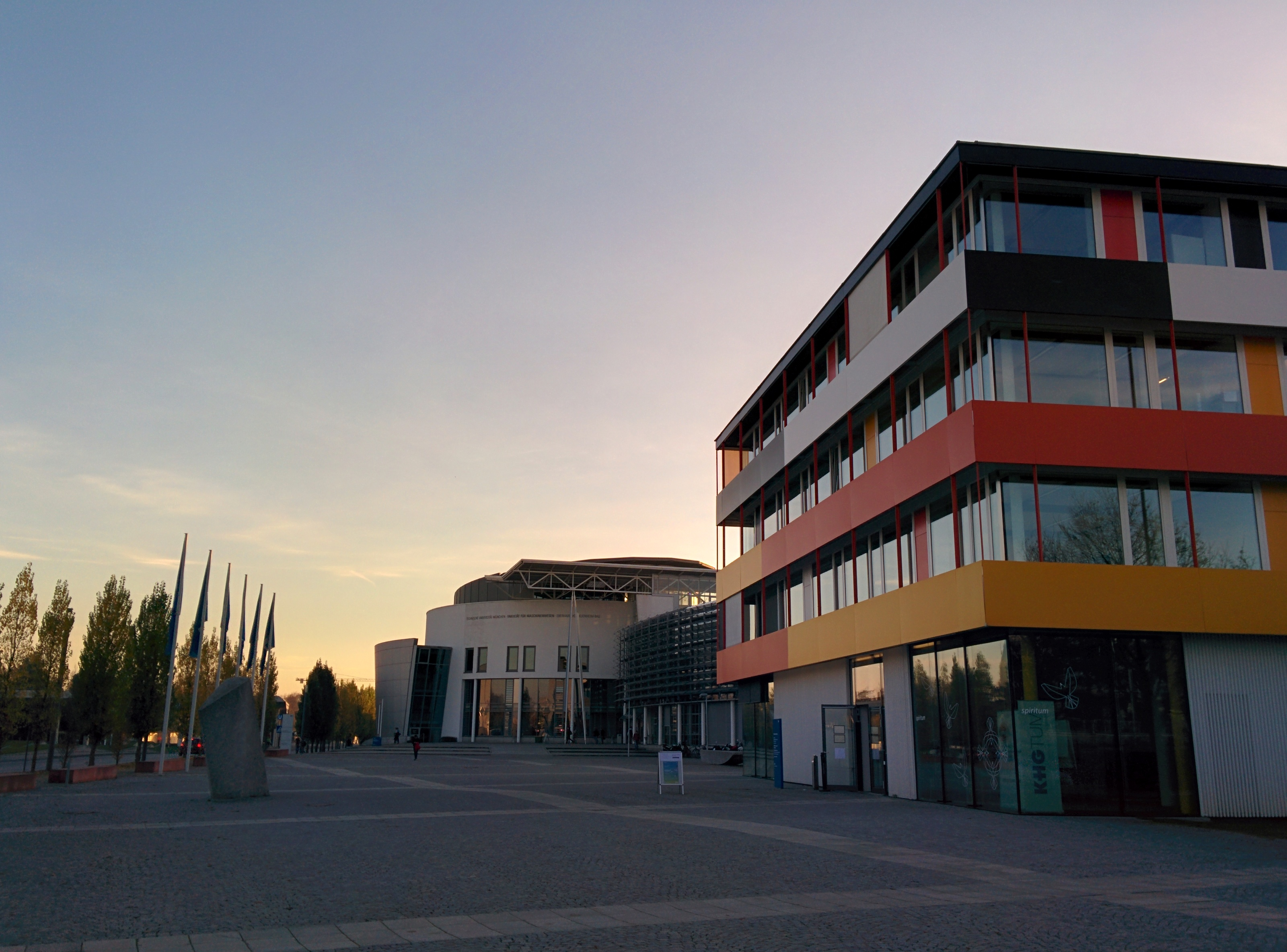 Technische Universität München Forschungszentrum Garching SpiriTUM und Maschinenbaufakultät